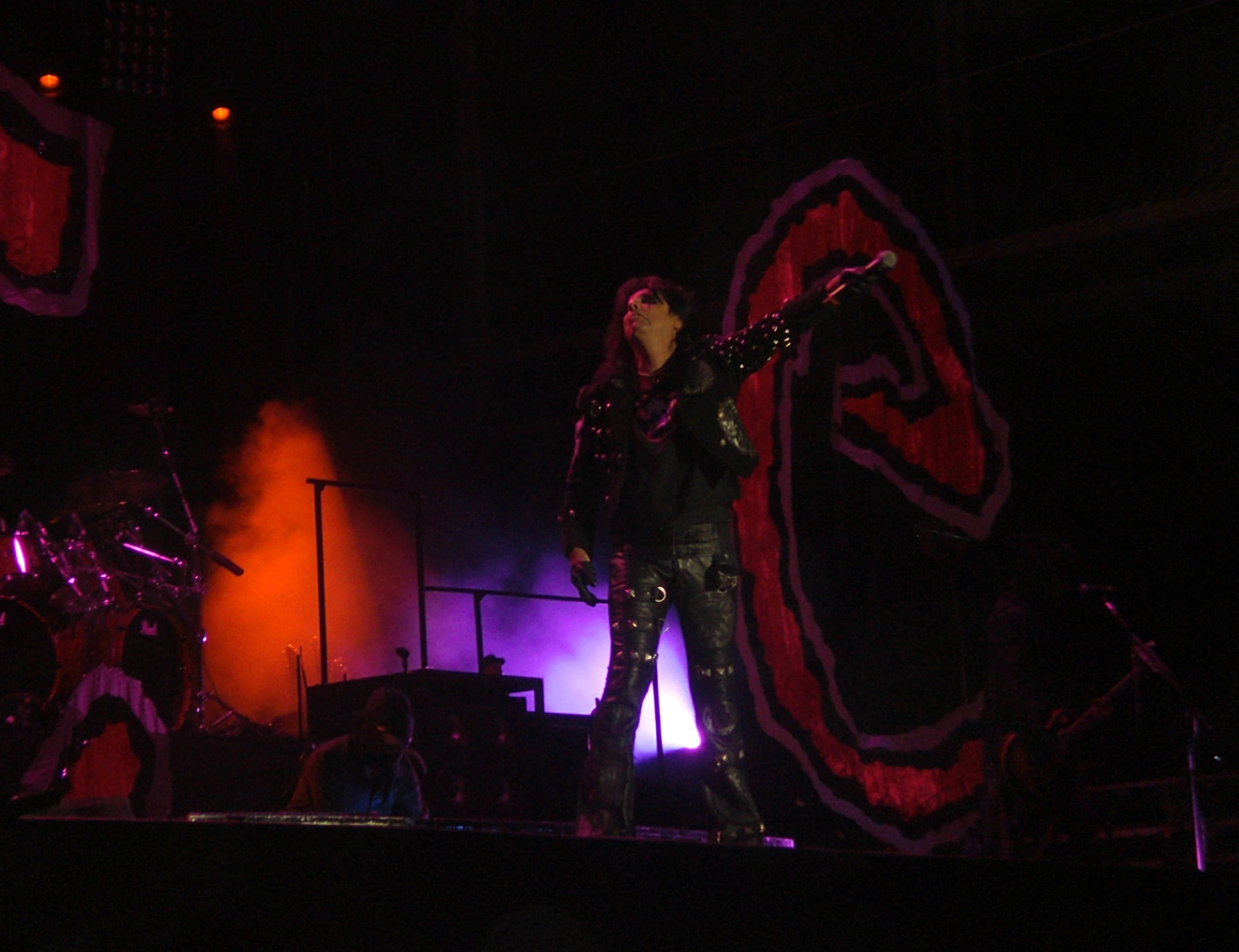 Alice Cooper lors de son concert en France au Hellfest 2010.